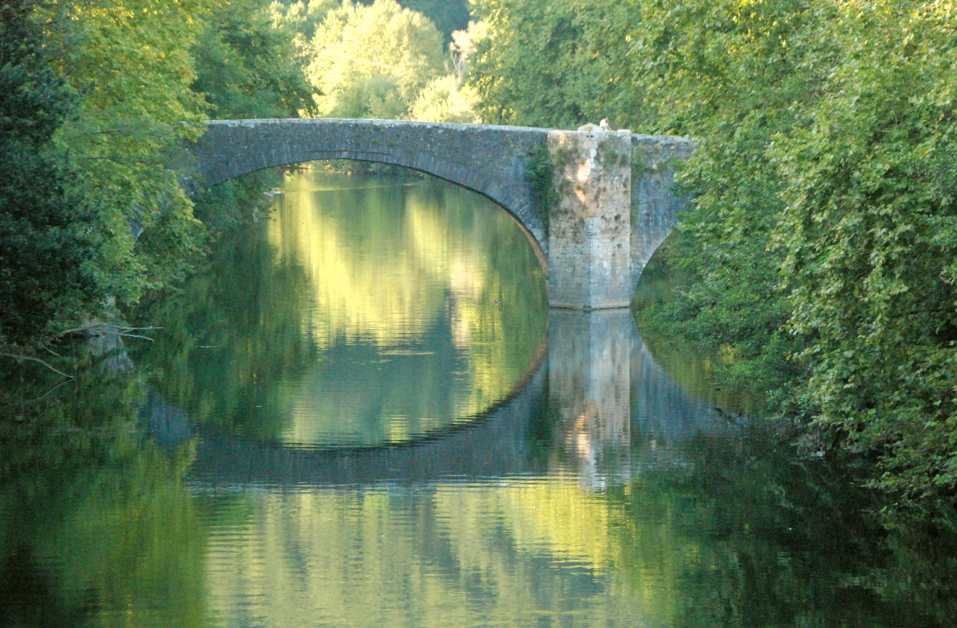 Bidasoako zubia Beratik hurbil